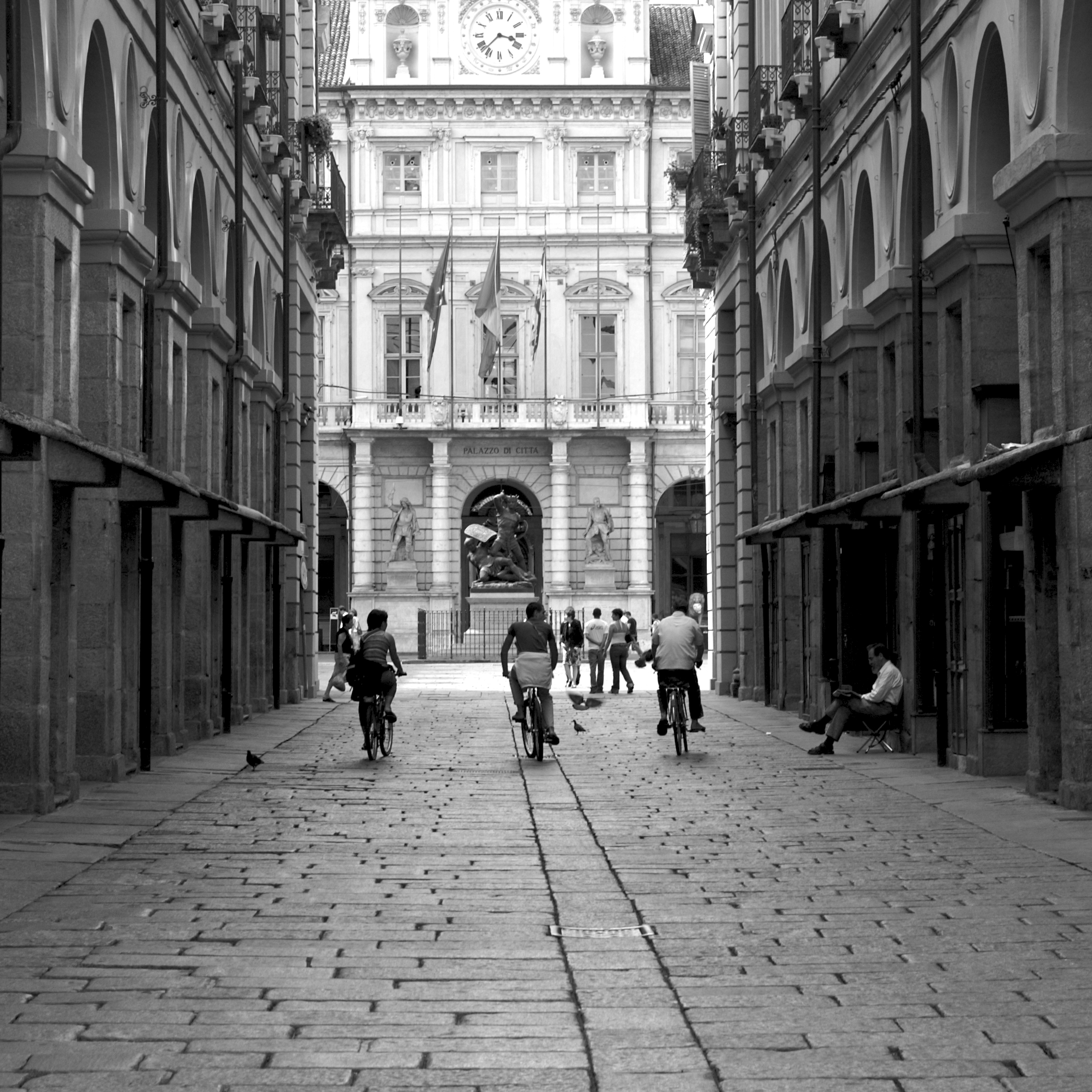 Torino, Pimonte, Italia